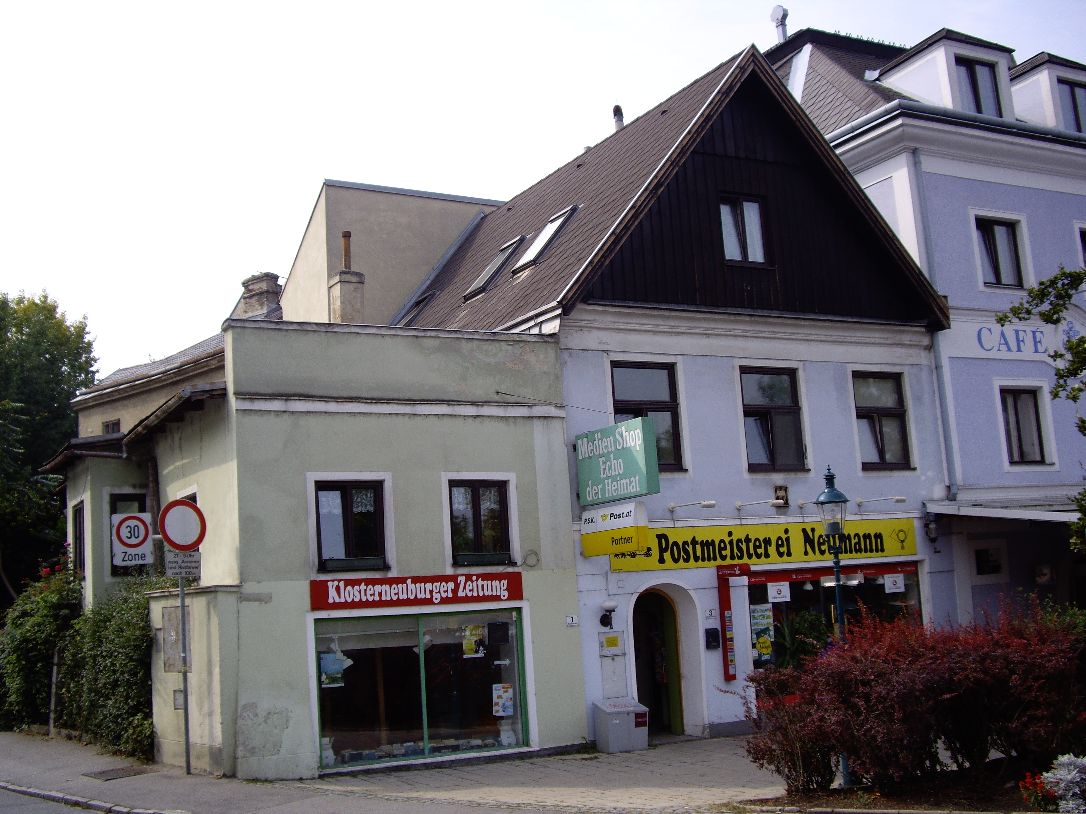 Domo de la loka gazeto "Klosterneuburger Zeitung" (Klostronovburga Gazeto)en Klostronovburgo.